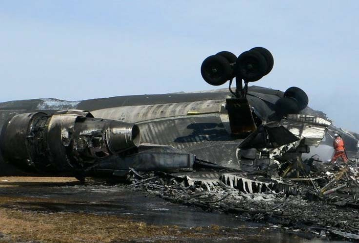 航空事故調査報告書AA2013-4-2より、フェデックス80便の残骸